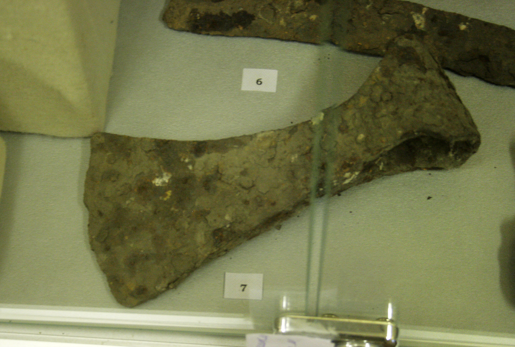 Топор Крапивенского городища. Древнерусская культура, X–XIII века. Из фондов Шебекинского историко-художественном музея.